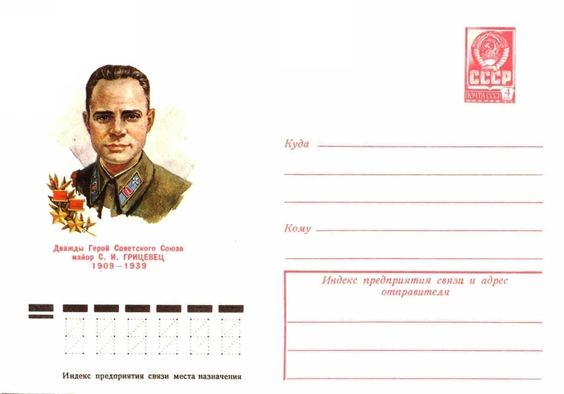 Грицевец Сергей Иванович почтовый конверт